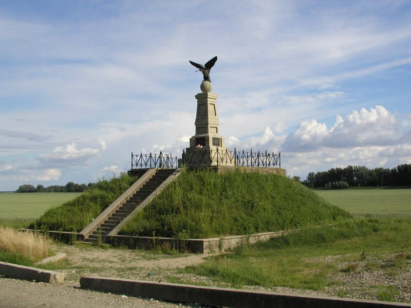 A Rákóczi szabadságharc első kuruc győzelmének és a tiszabecsei átkelésnek az emlékoszlopa a Tiszabecse-Tiszaújlak határátkelő közelében